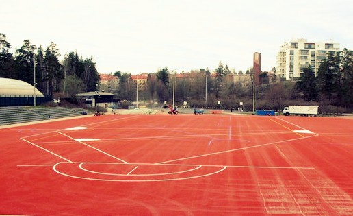 Meilahden pesäpallostadion Helsingin Meilahdessa.